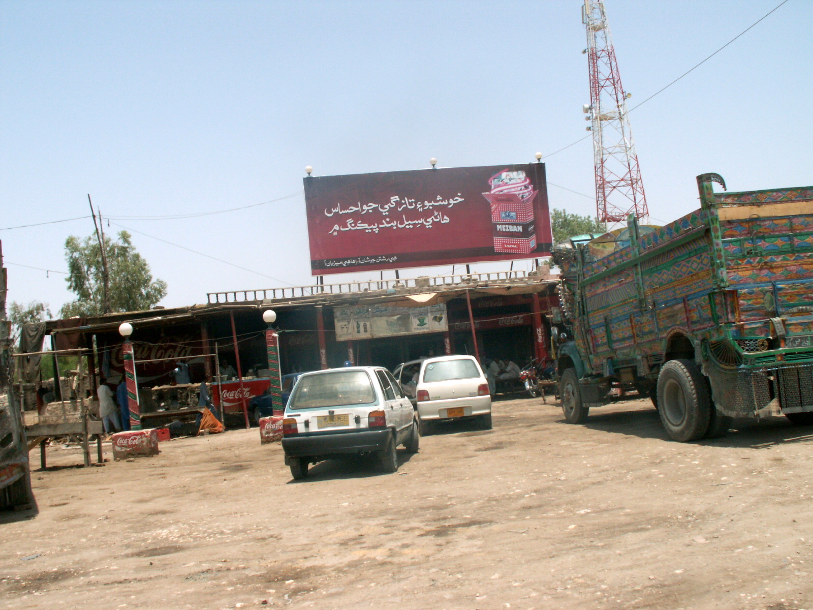 Layek Hotel Dadu